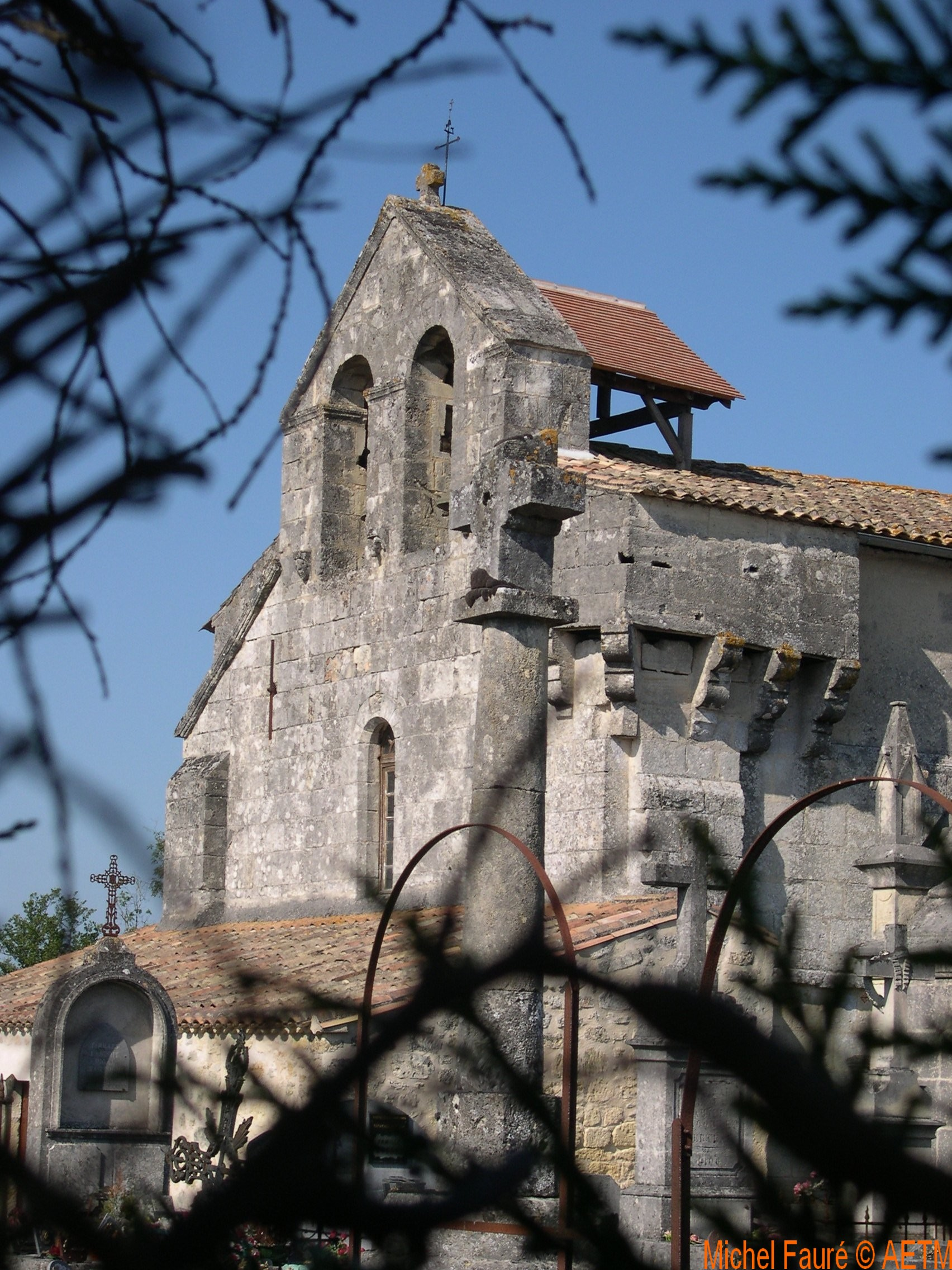 Eglise templière de Marcenais, vue depuis l'exterieur.